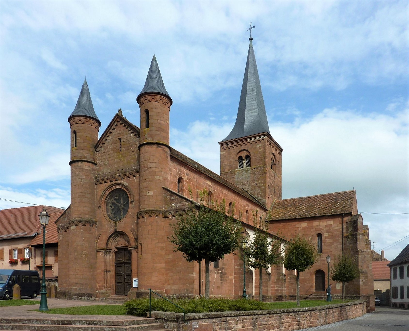 Église Saint-Adelphe, Neuwiller-lès-Saverne